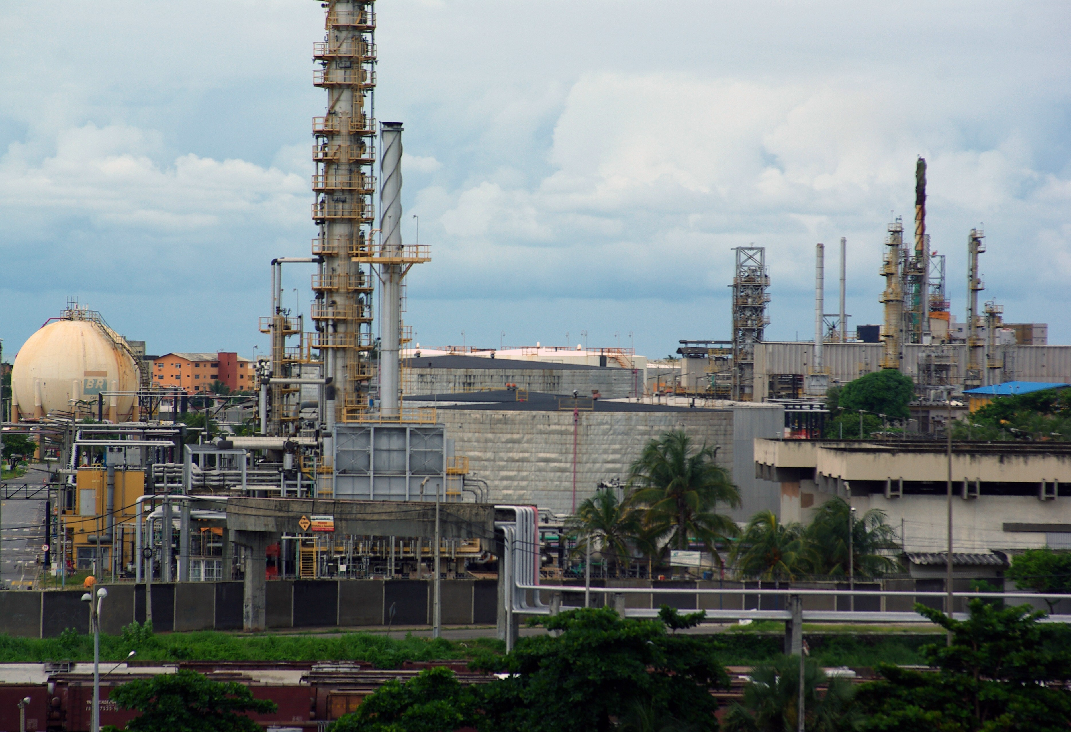 Porto do Mucuripe - Fortaleza-CE